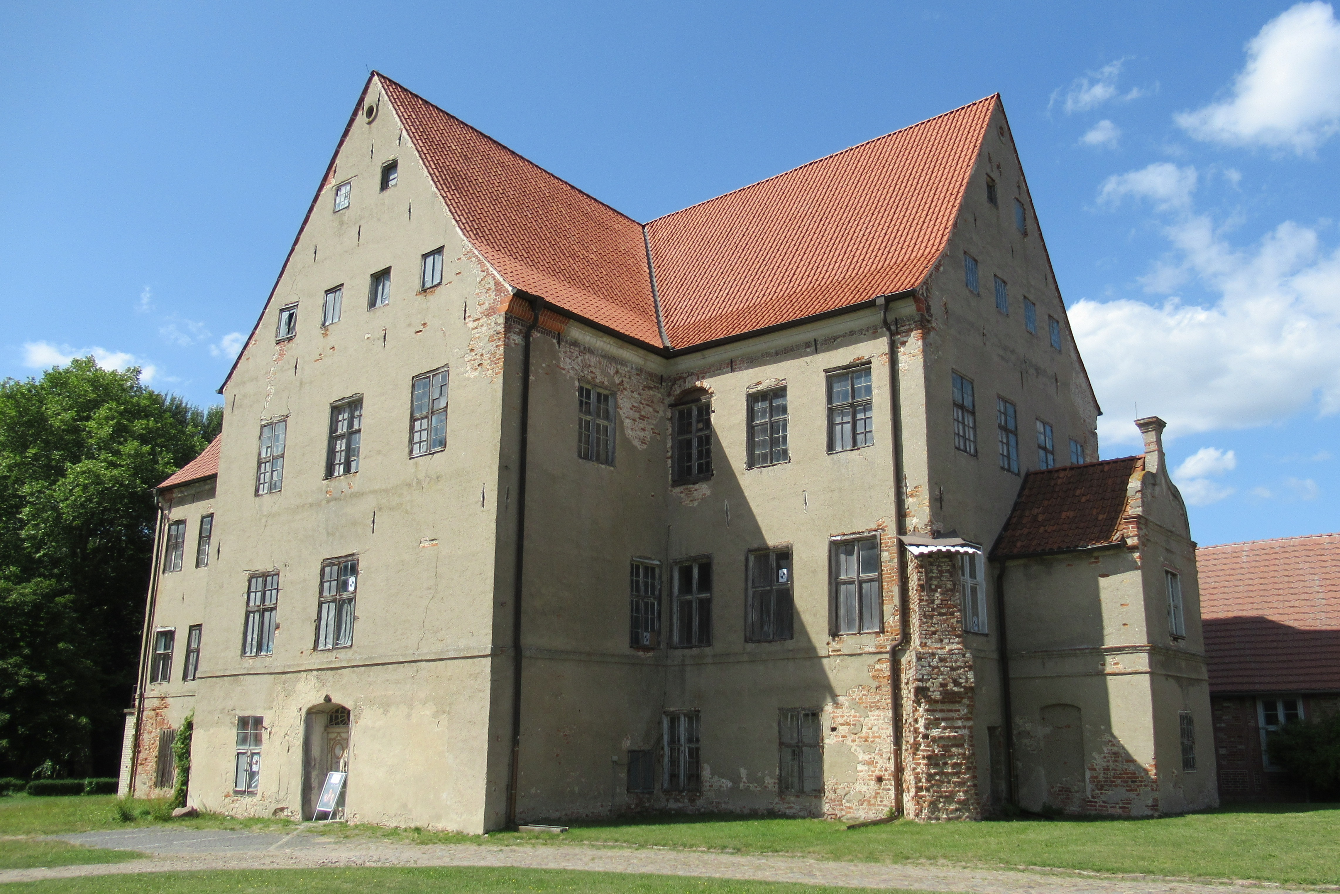 Schloss Ludwigsburg (Landkr.Vorpommern-Greifswald), Südfassade